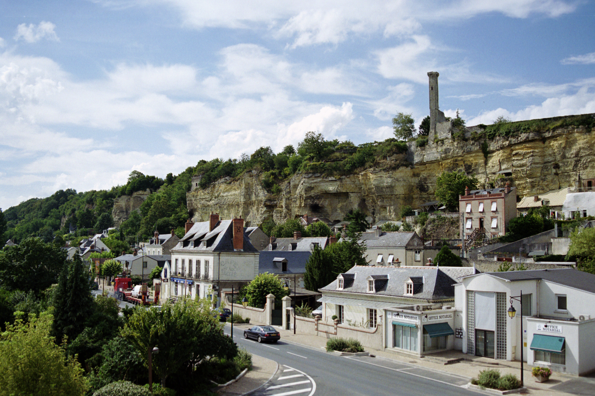 La "lanterne" de Rochecorbon, Prise réalisée à partir de l'« Observaloire »...